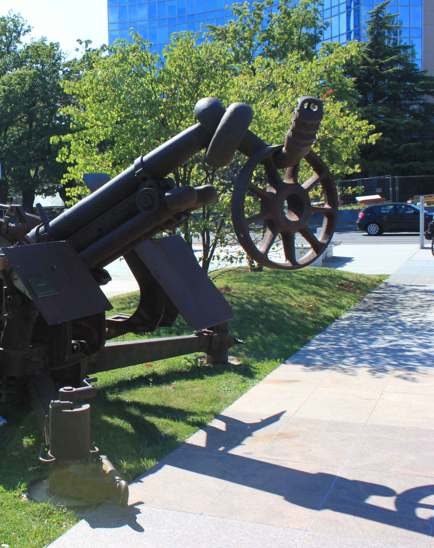 Frieden Uploader’s description